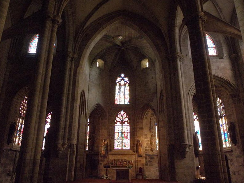 Vue d'ensemble du chœur de la basilique Notre-Dame de Bon-Secours de Guingamp (22). .